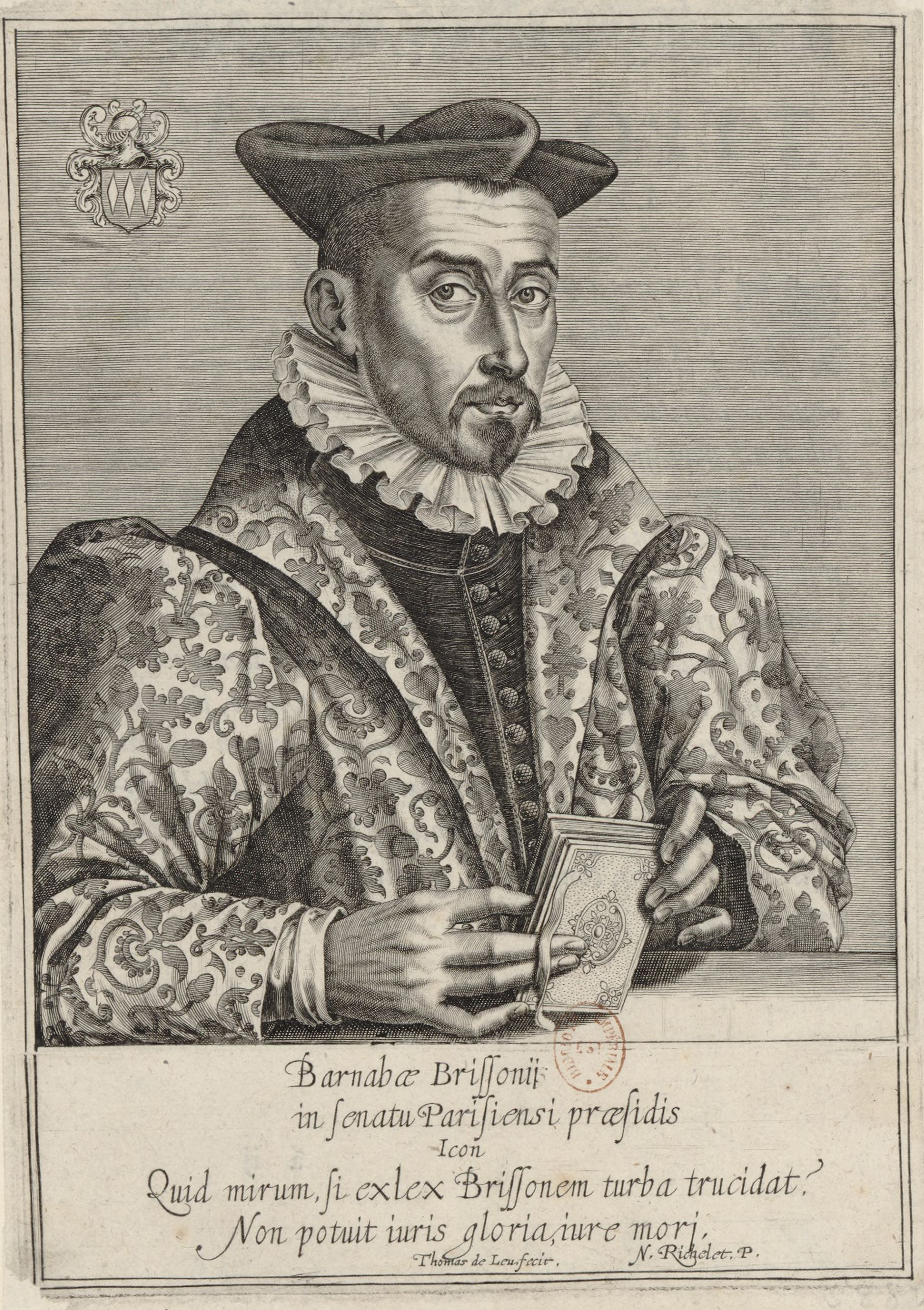 Portrait de Barnabé Brisson (1531-1591), en buste, de 3/4 dirigé à droite. Estampe du graveur Thomas de Leu (1555?-1612?).